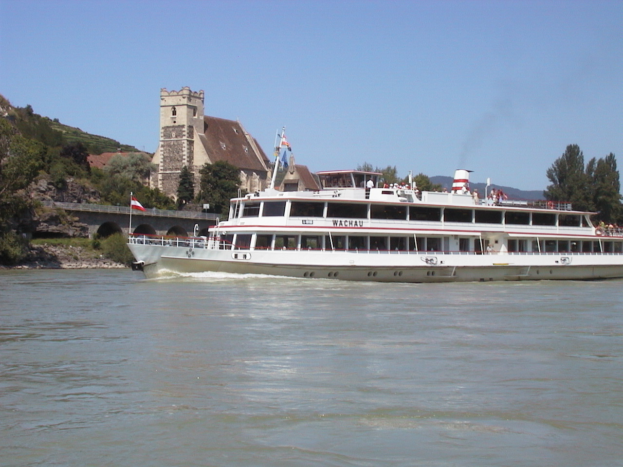 DDSG Blue Danube Ausflugsschiff MS "Wachau" vor St. Michael (Wachau, Österreich)